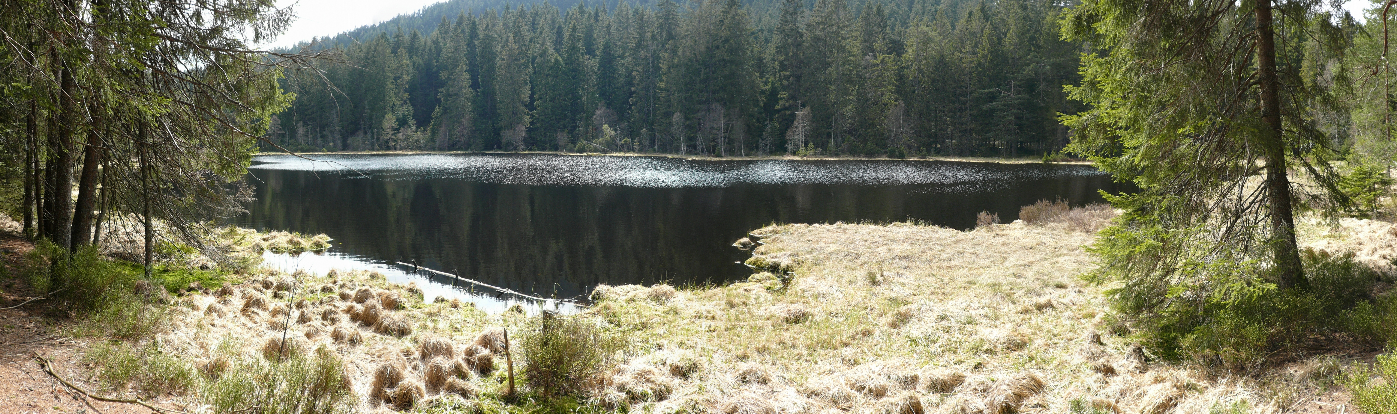 Lake Herrenwieser See, Black Forest